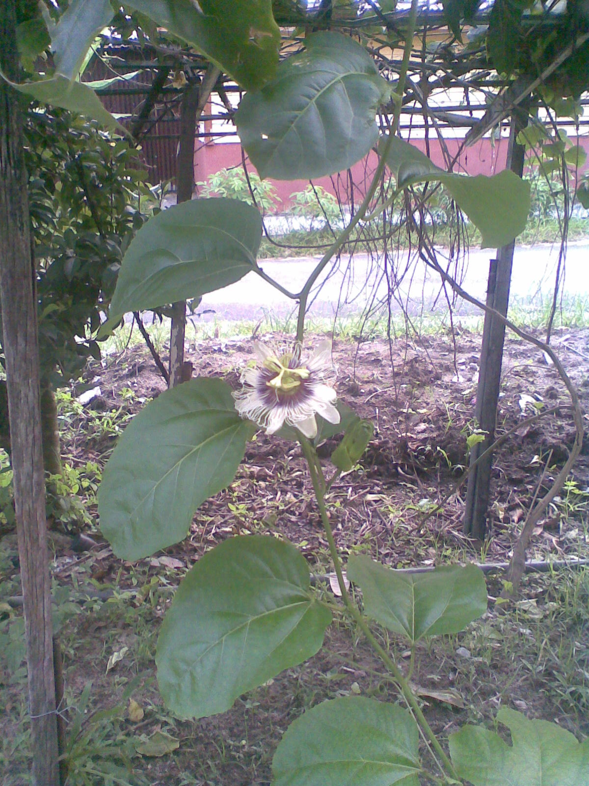 Markisa Flower